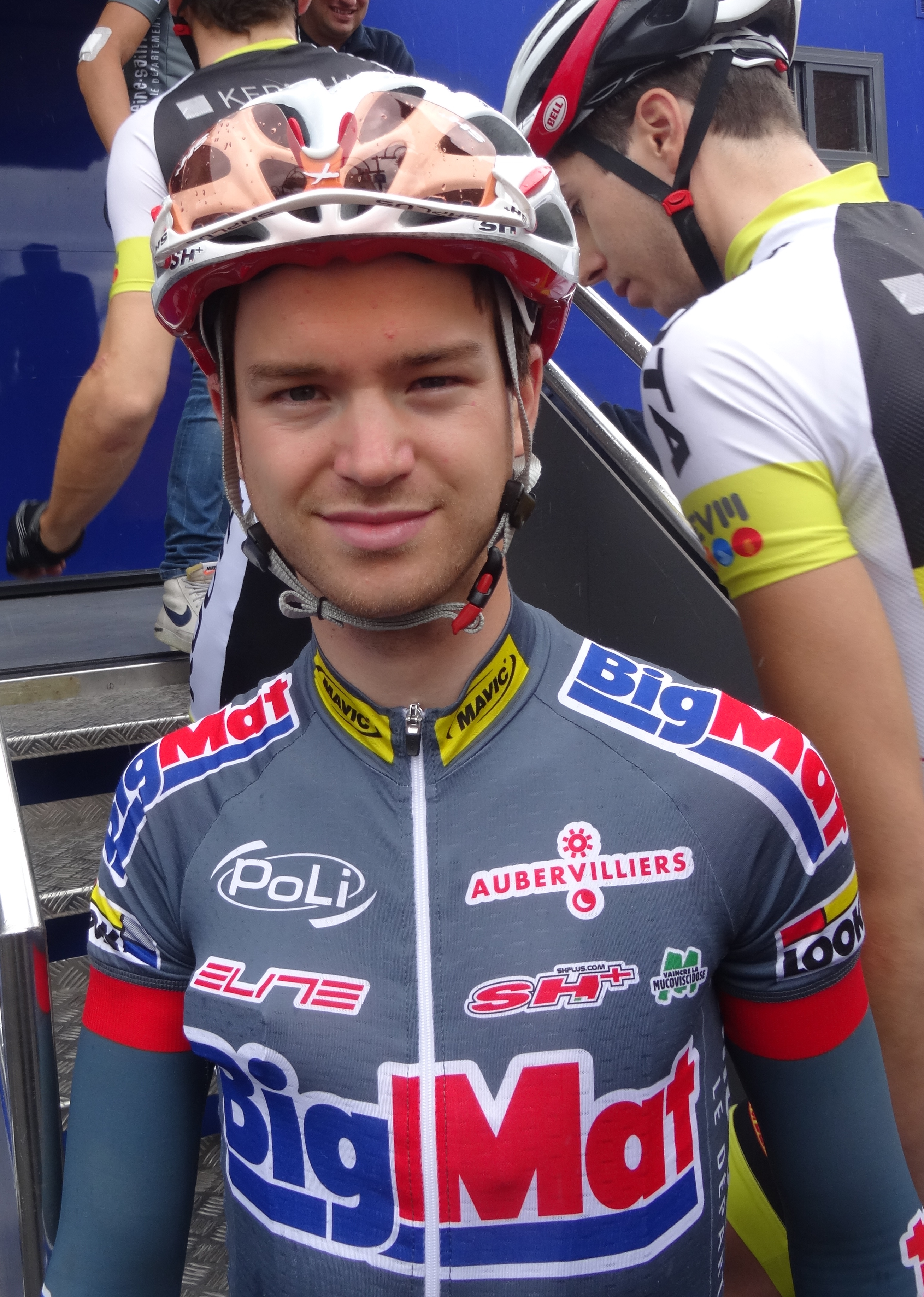 Reportage photographique réalisé le dimanche 13 juillet à l'occasion du départ et de l'arrivée de la Ronde pévéloise 2014 à Pont-à-Marcq, Nord-Pas-de-Calais, France.